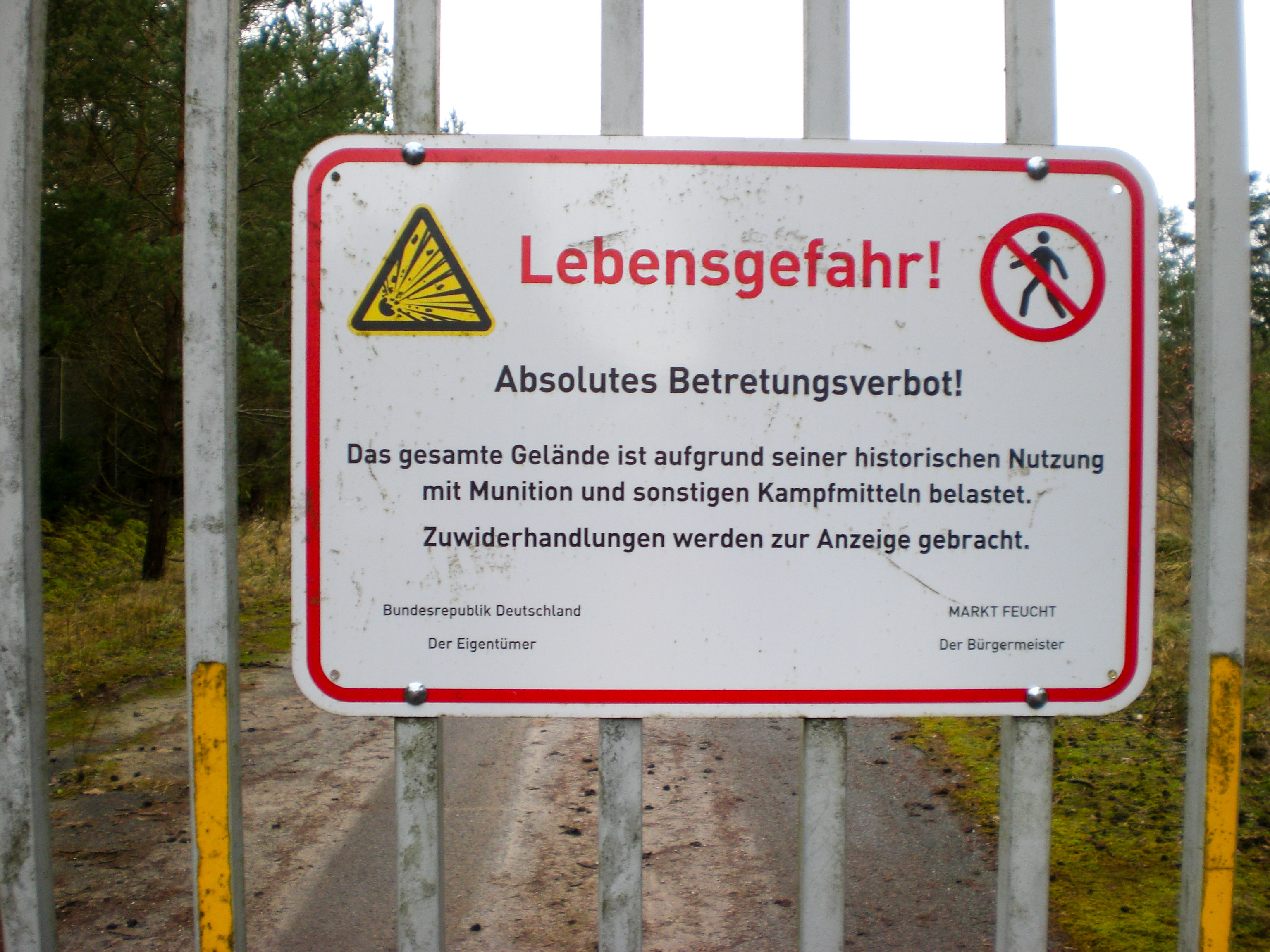 Heeresmunitionsanstalt Feucht, Warnschild